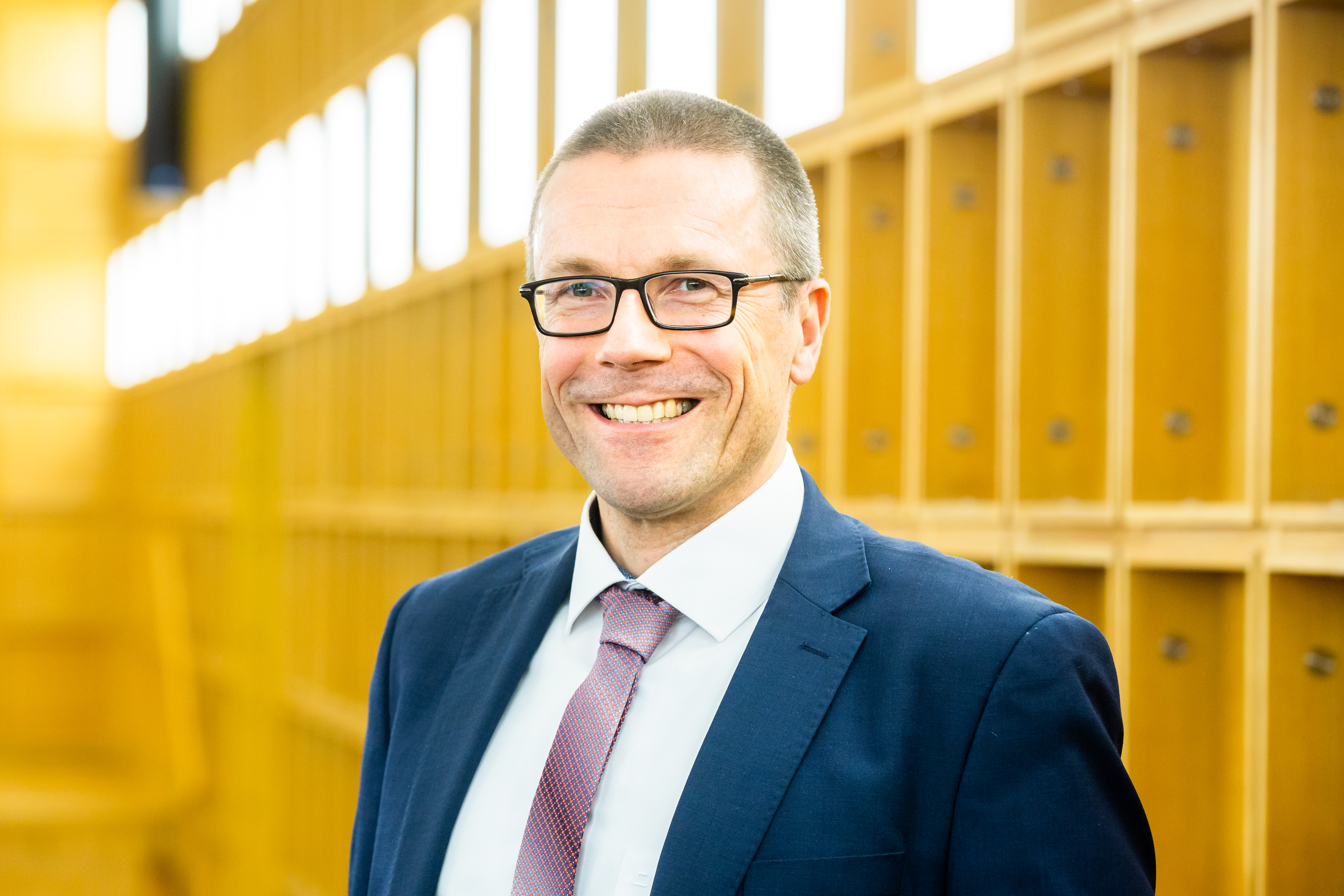 Uwe Schneidewind (2019)